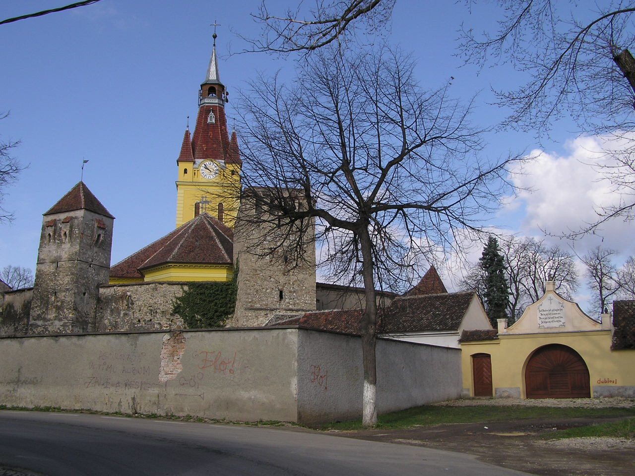 Die Kirchenburg von Cristian / Neustadt bei Kronstadt in Siebenbürgen, Rumänien.